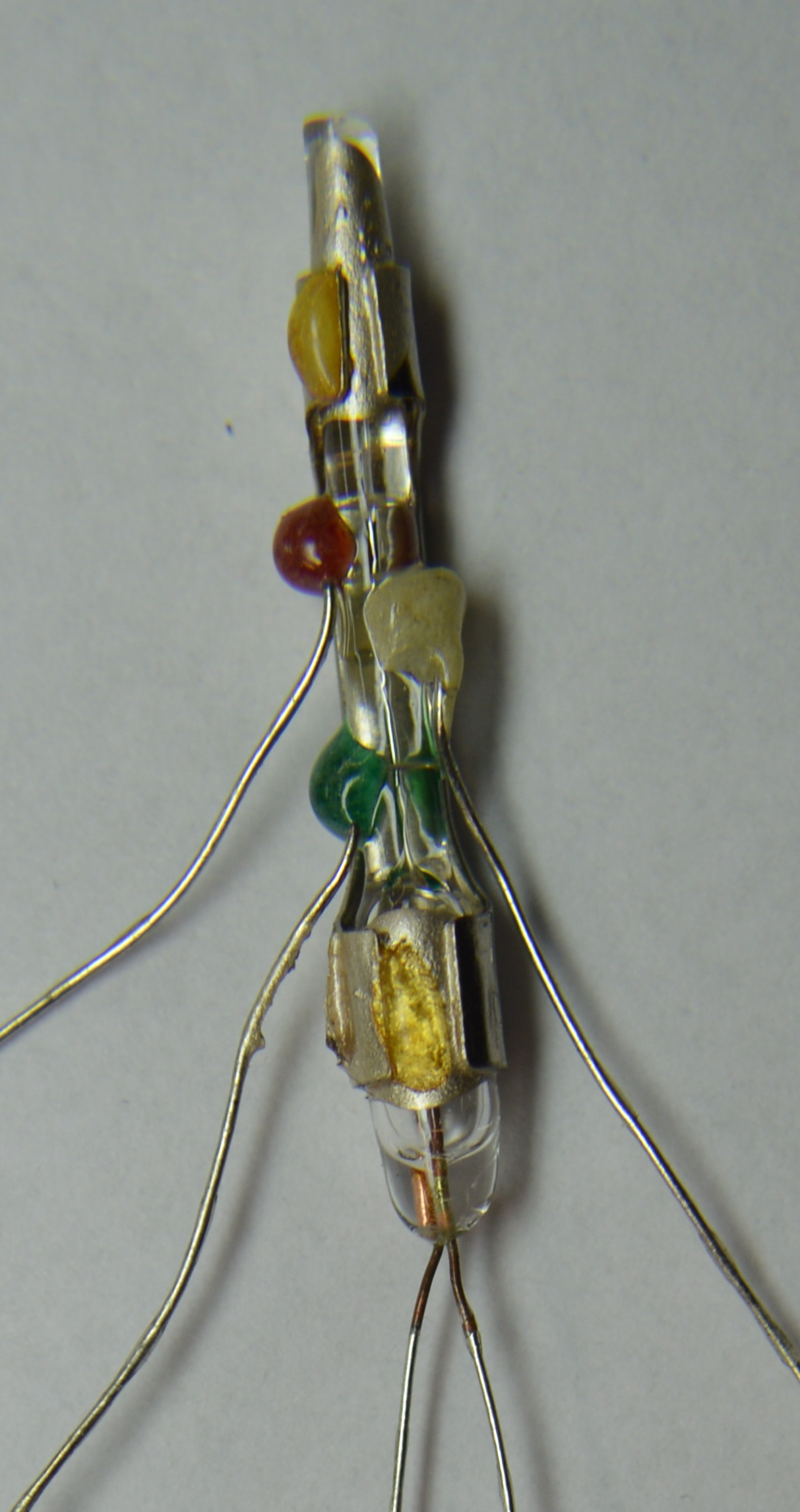 Umschalt-Relais